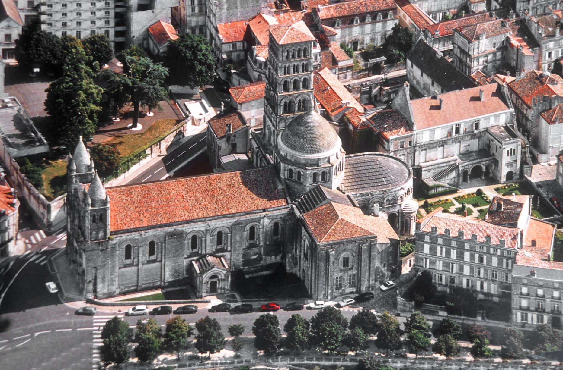 Cathédrale Saint-Pierre. Dominant les remparts de la ville, édifiée sur les ruines de monuments antérieurs, c'est au cours des 12ème et 13ème siècles qu'elle acquit son architecture actuelle. .